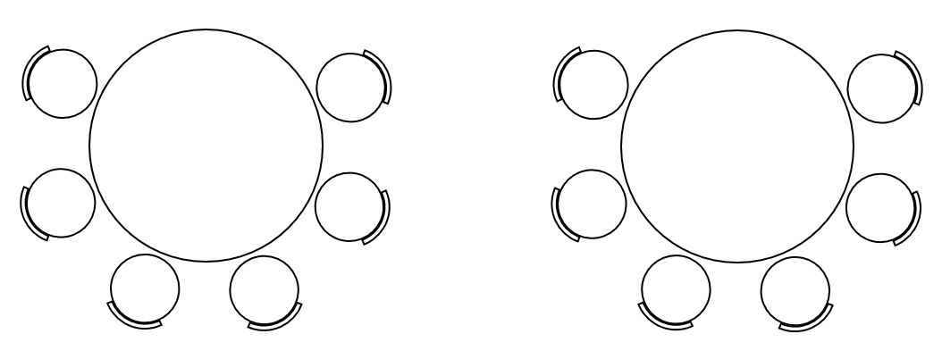 Bordoppsett Runde bord konferanse